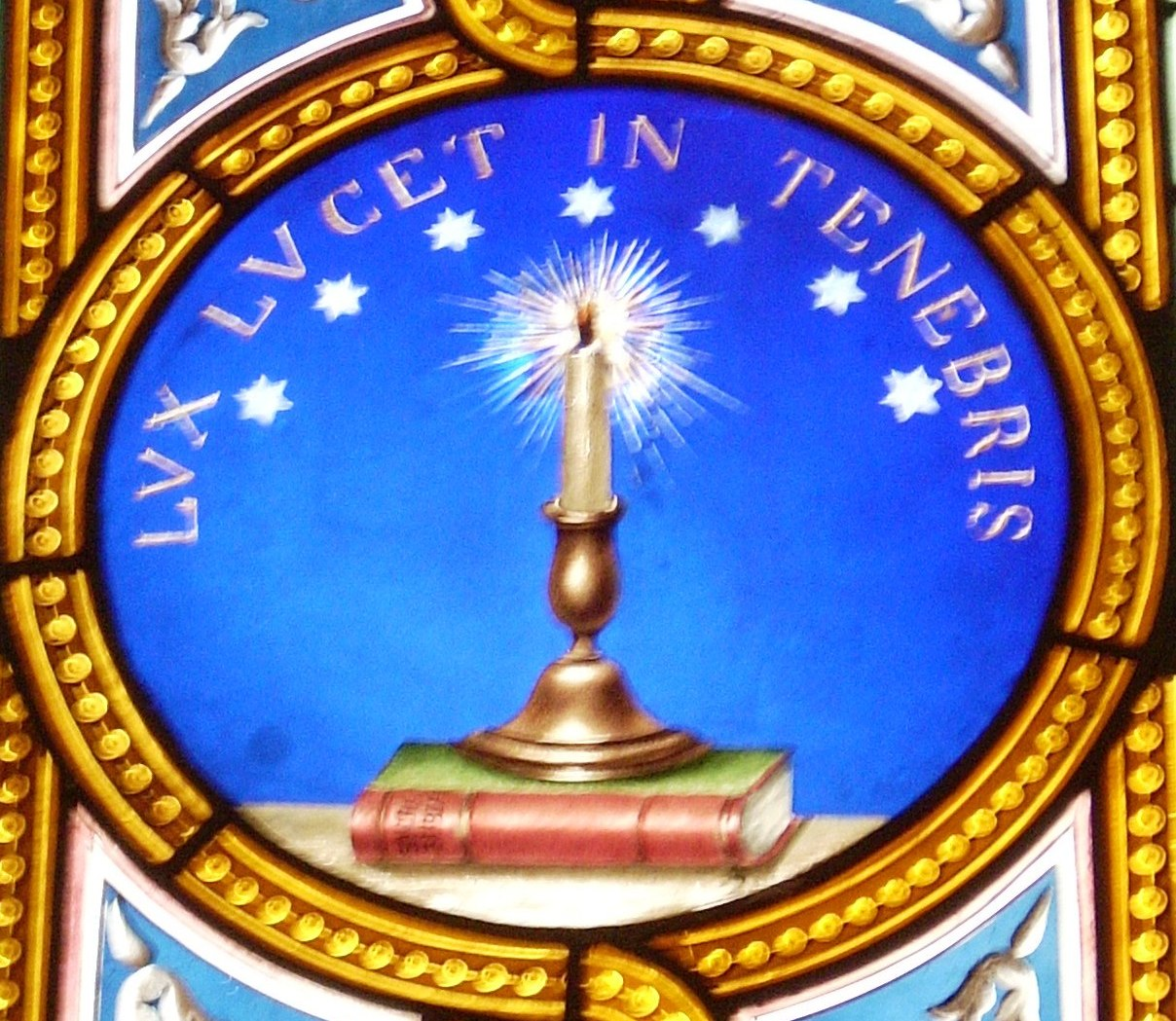 Vetrata della chiesa valdese di via IV Novembre di Roma